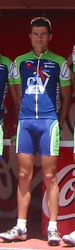 Comunidad Valenciana, Euskal Bizikleta 2005 David Muñon Bañón